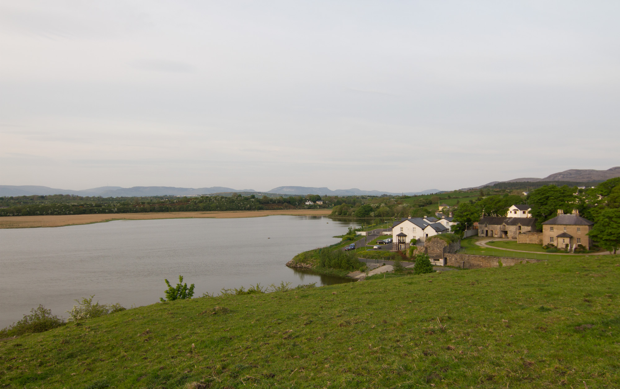 Ballysadare Ballysadare Bay.